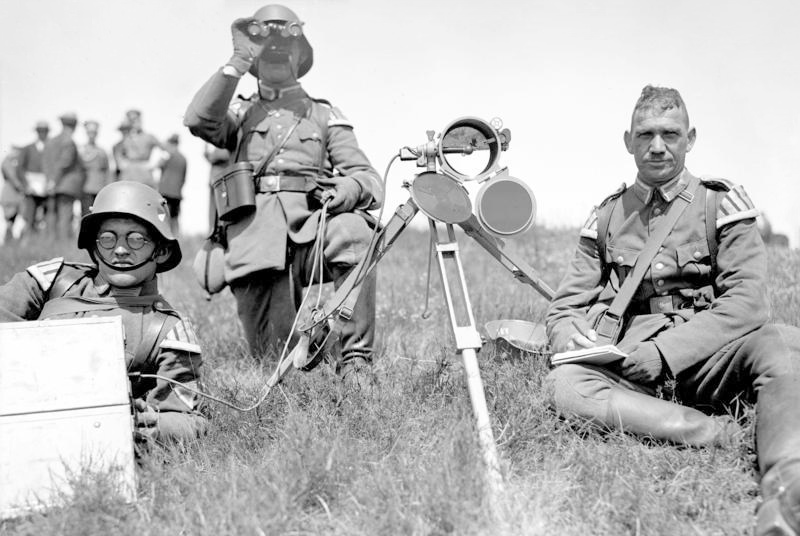 Die ersten diesjährigen grossen Reichswehr-Manöver in der Gegend Munster im Hannoverschen! Ein neuer Blinkzeichen-Apparat der Reichswehr zur Übermittlung von Meldungen im Manövergelande.